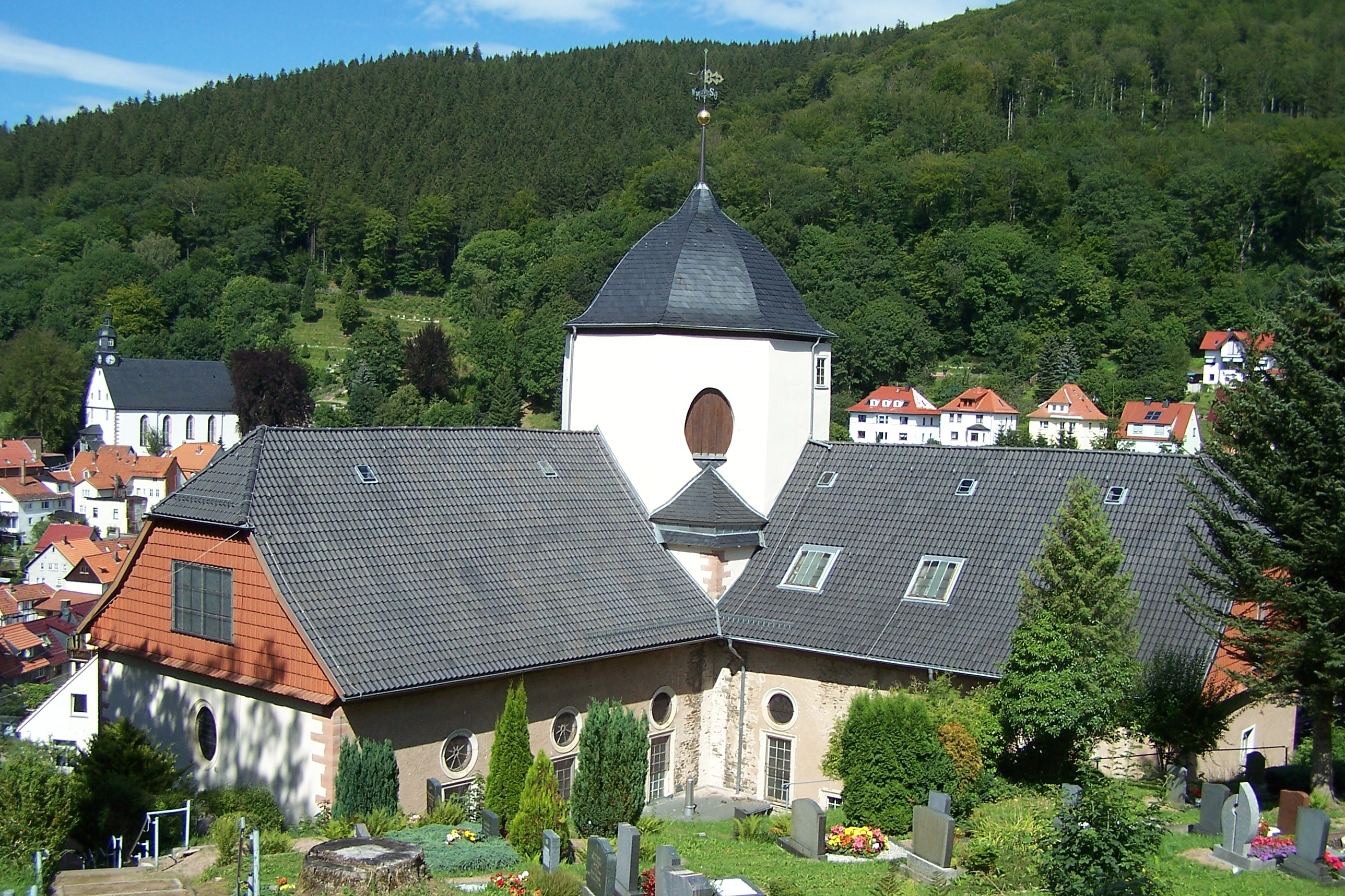 Ansichten und Details zur Concordia-Kirche in Ruhla.